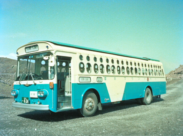 マウントカー